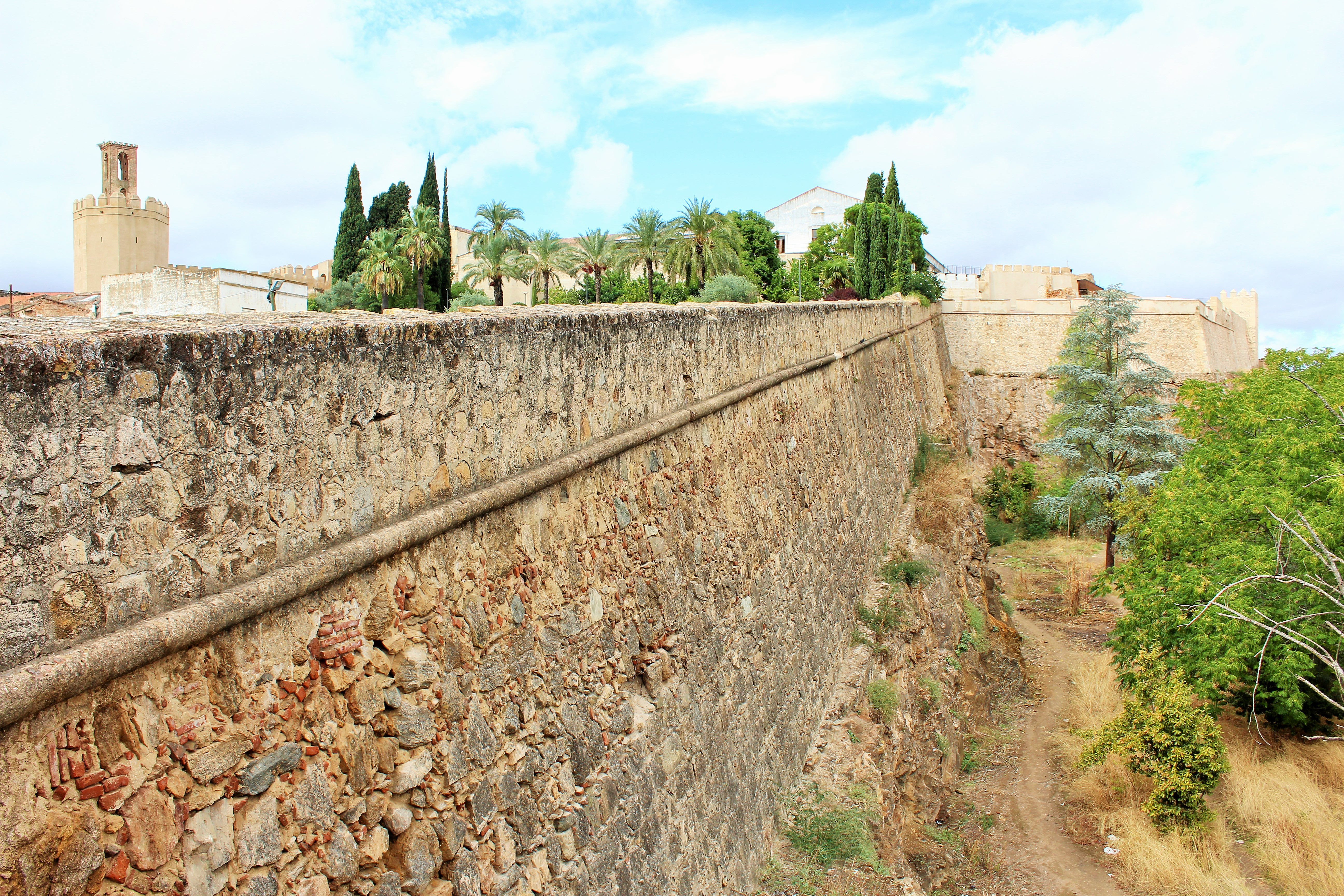 Gran lienzo elevado sobre roca y Torre de Espantaperros al fondo, a la izquierda.